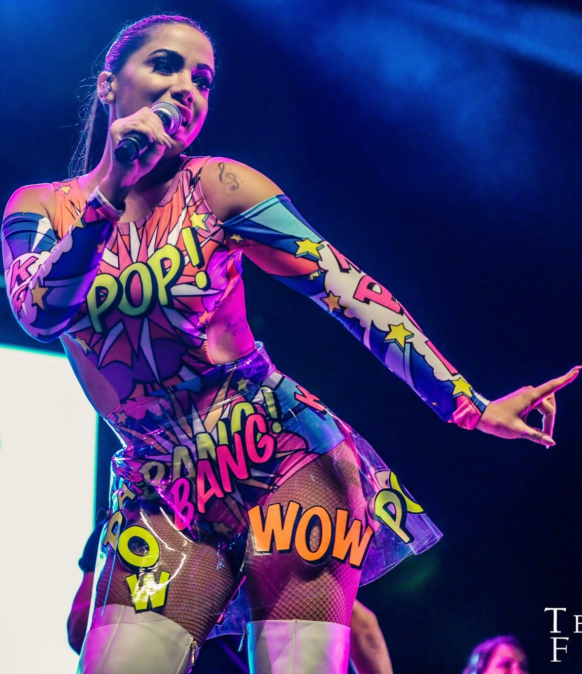 Anitta em show da turnê Show das Poderosinhas em 2016